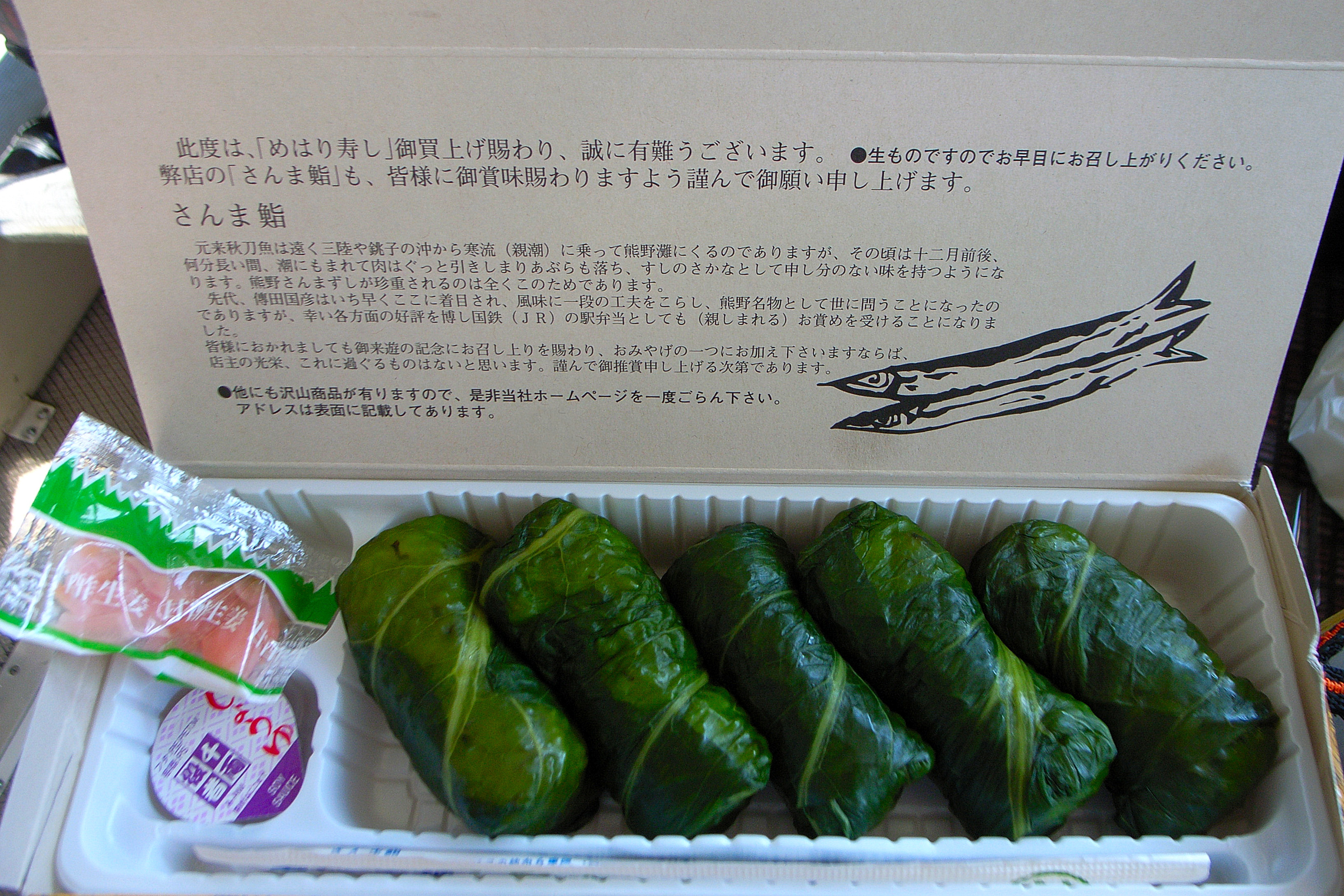 July 28, 2007 at 14:14 JST, Wakayama